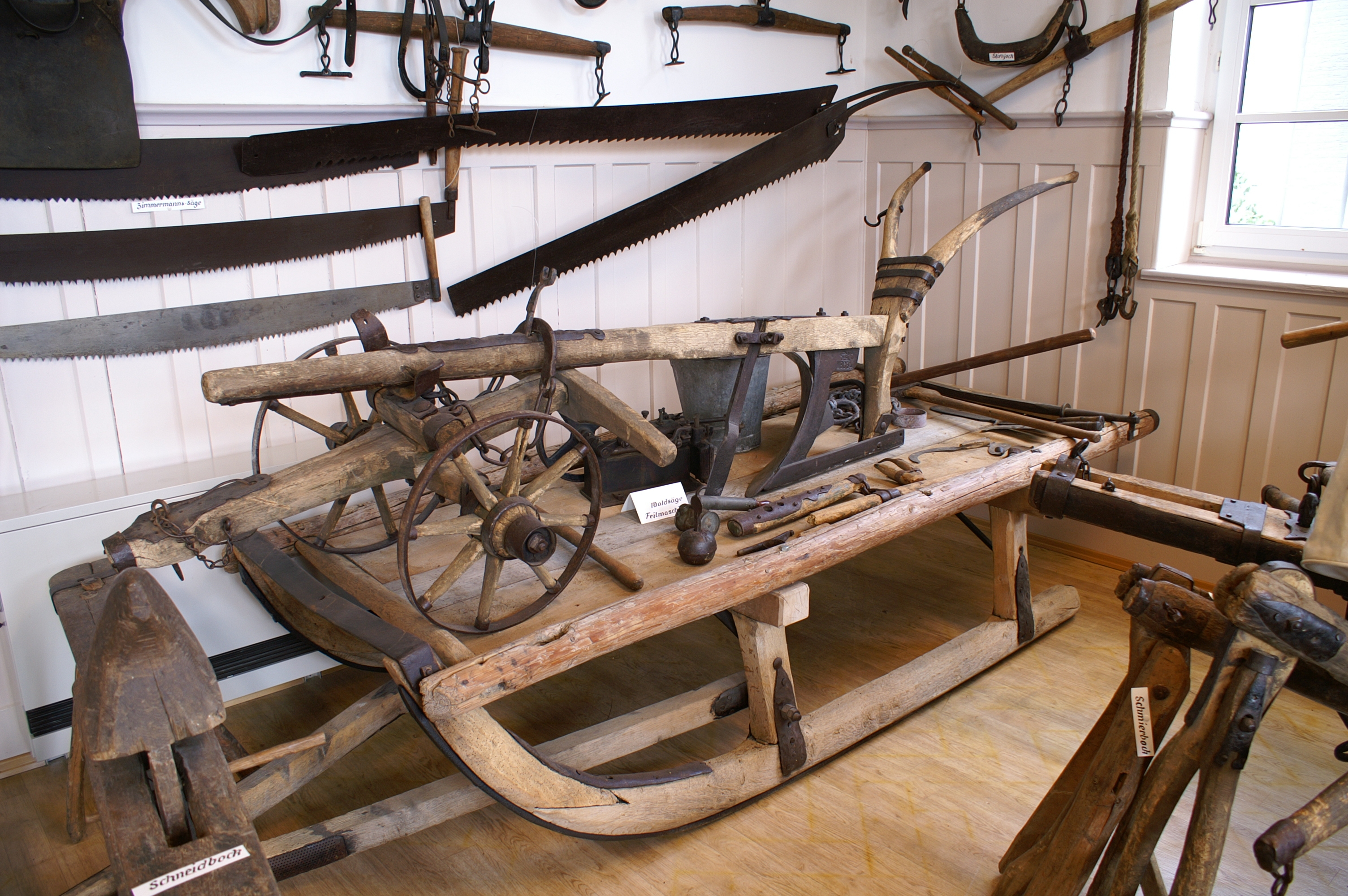 Im Nellinger Heimatmuseum befindet sich eine Sammlung verschiedener historischer landwirtschaftlicher Geräte